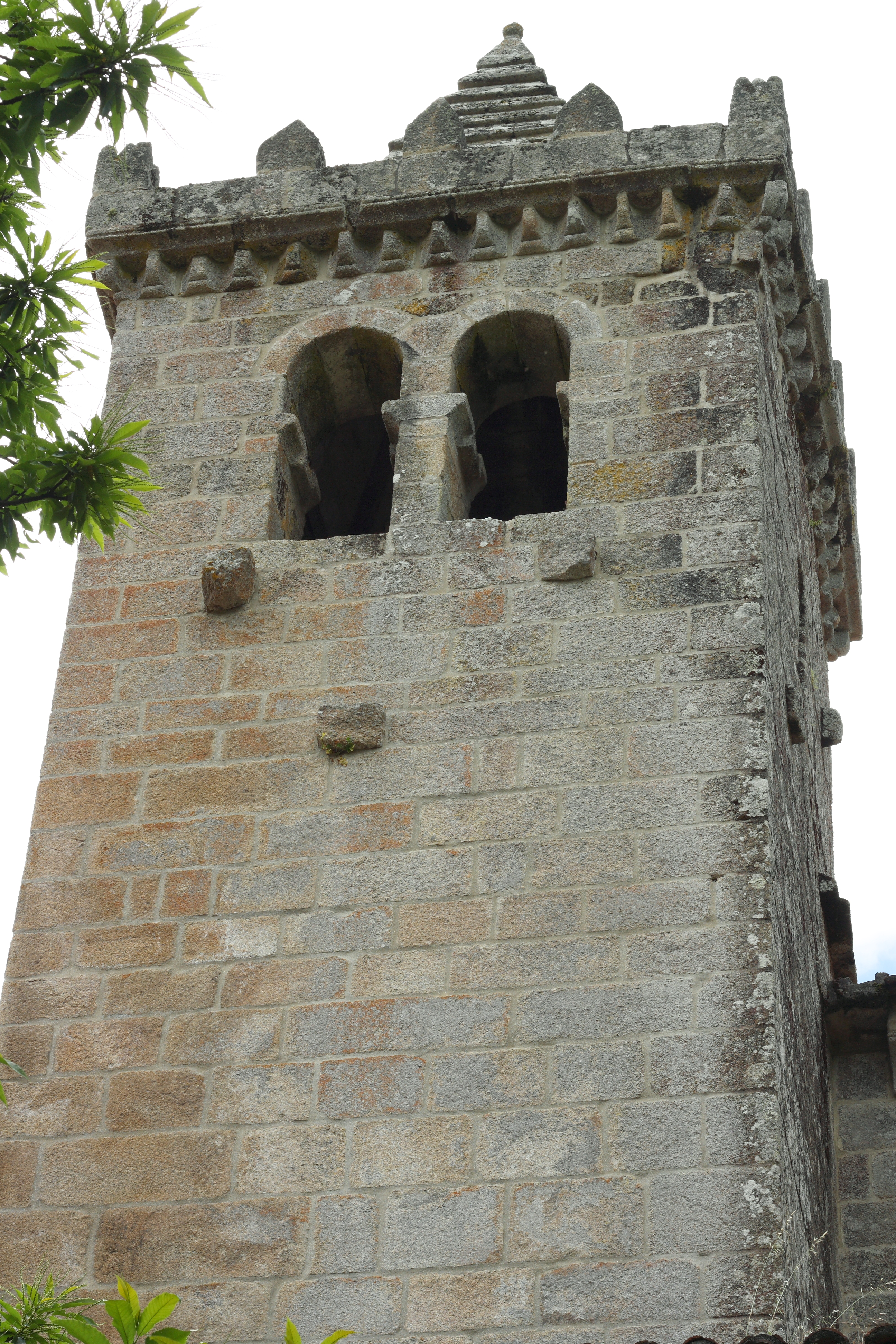 Ehemaliges Kloster Santa Cristina de Ribas de Sil (Parada de Sil) in der spanischen Provinz Ourense (Galicien), Glockenturm